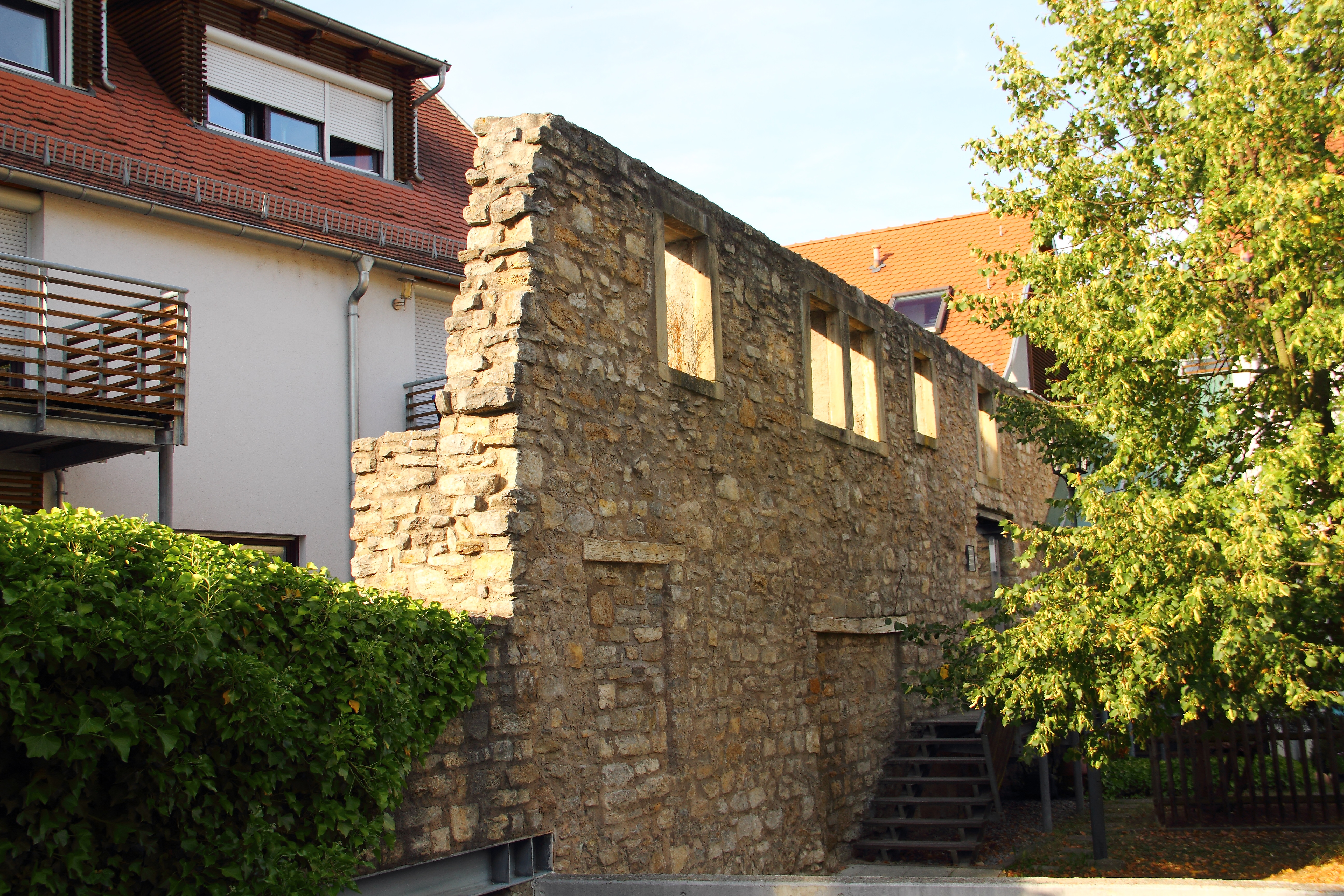 Reste der Weikersheimer Stadtmauer im Bereich der Wilhelmstraße, Südost.